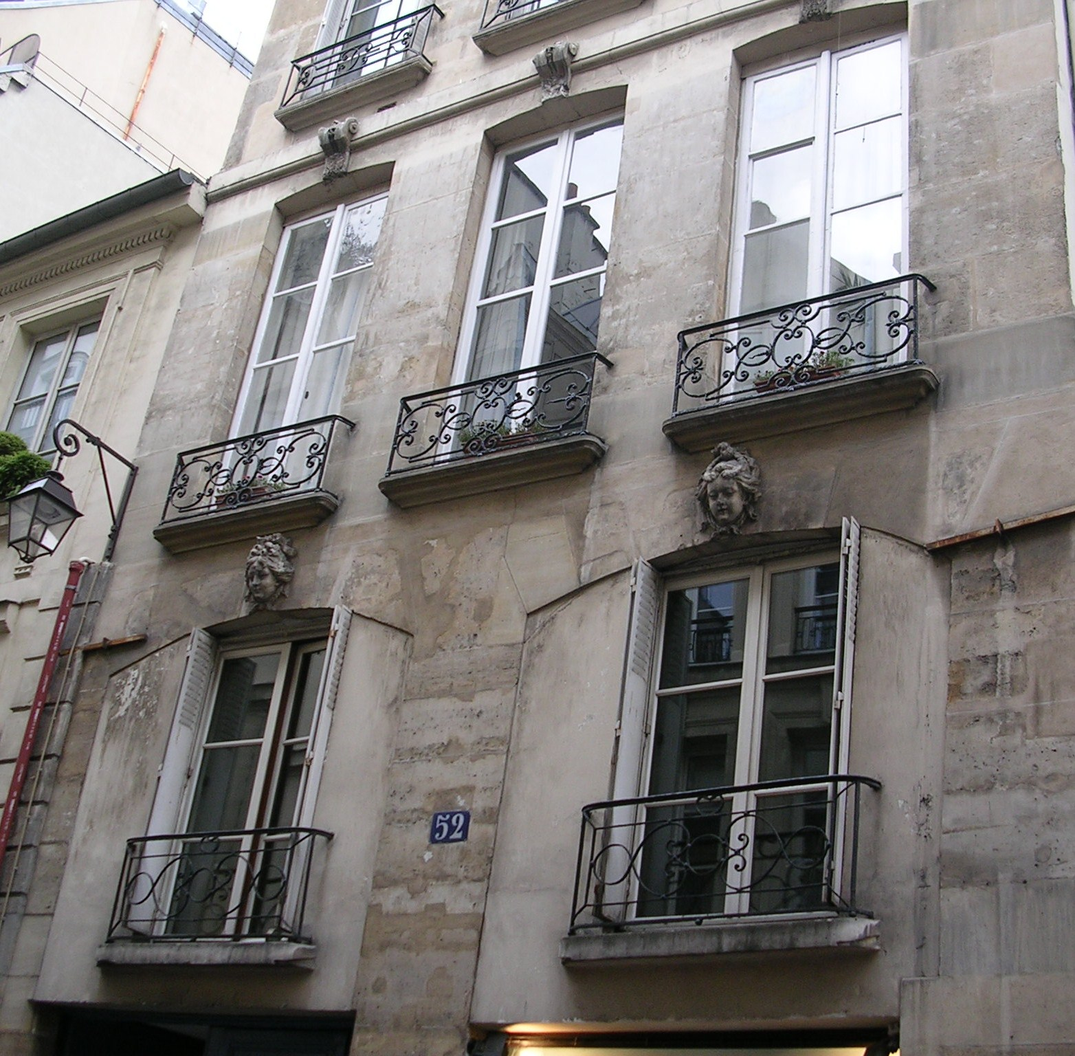 façade 52 rue de la verrerie